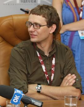 Владимир Машков, советский и российский актёр. Пресс-конференция Владимира Машкова и Алексея Учителя, Одесский международный кинофестиваль 2010. Depicted people: Владимир Машков, Виктория Тигипко and Денис Иванов